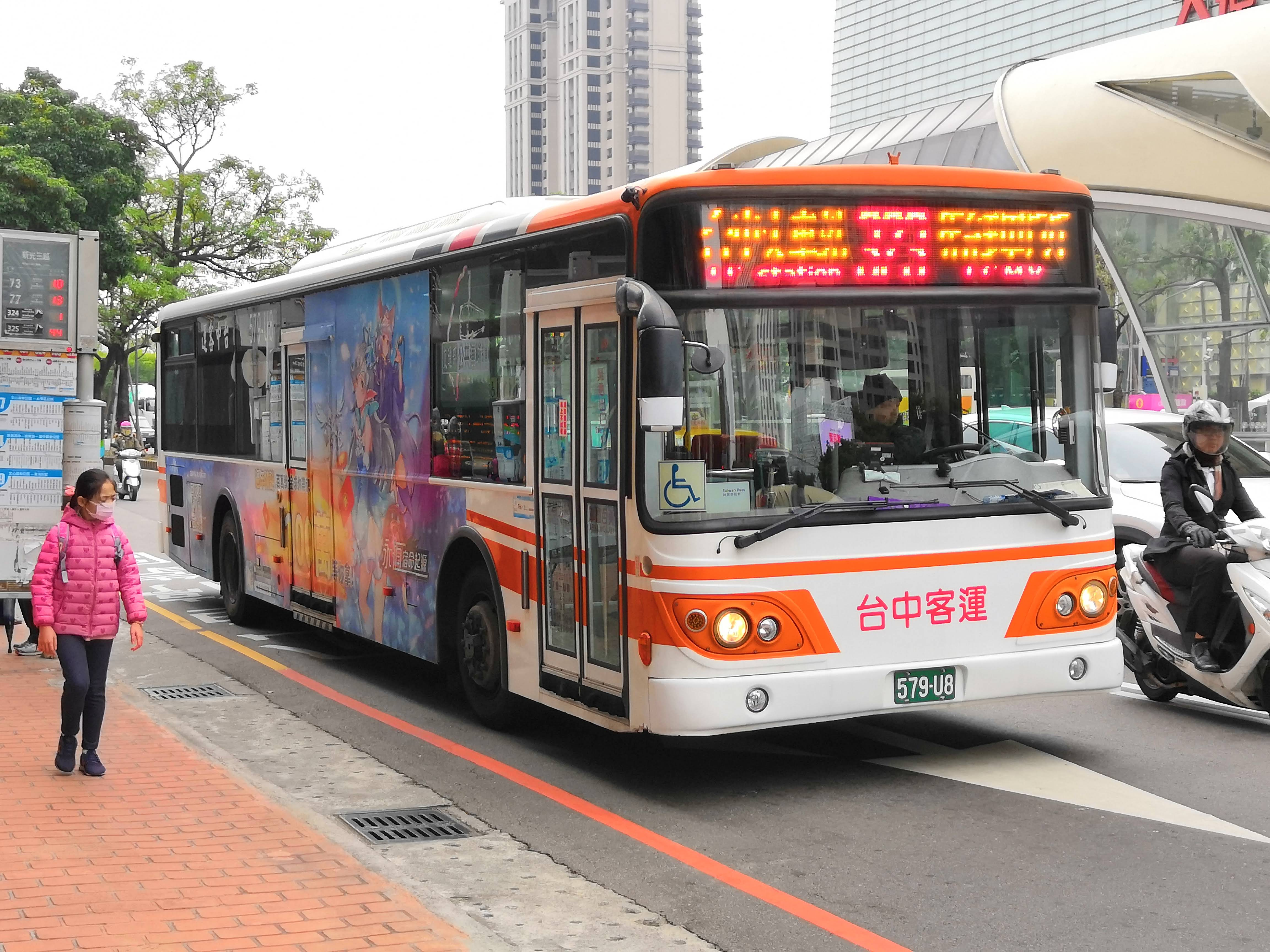 臺中客運台中市公車323路 大宇BS120CN大客車 579U8